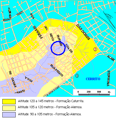 Visão Geral do sitio paleontológico cancela